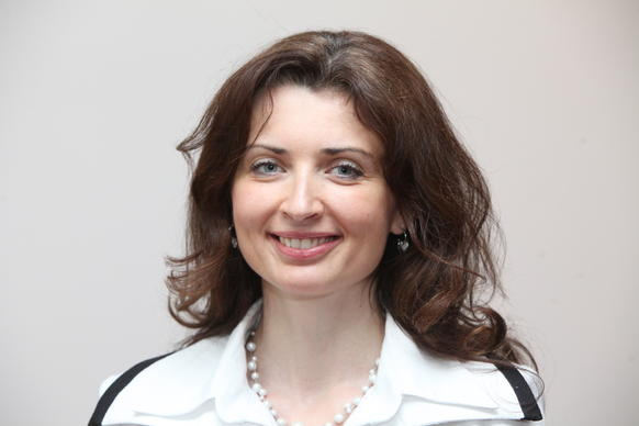 Mgr. Monika Šimůnková vládní zmocněnkyně pro lidská práva